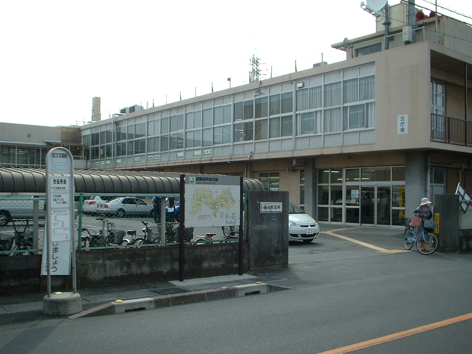 桶川市役所本庁舎